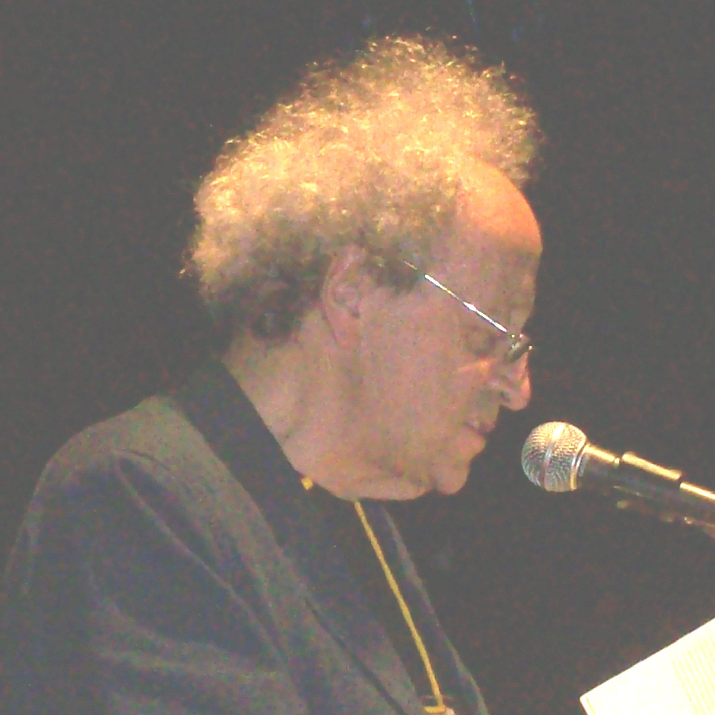 Bernard Noël, poeta francés, en la inauguración del XVIII Festival Internacional de Poesía de Medellín